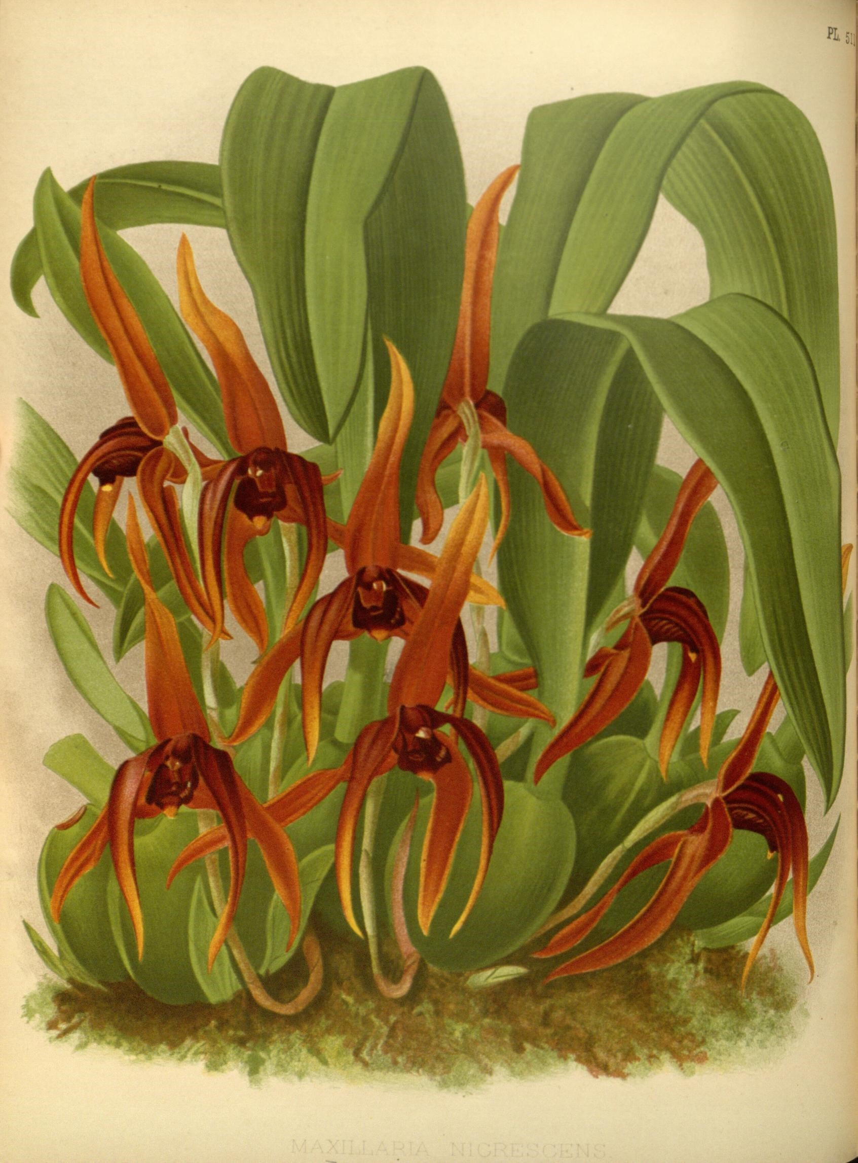 J^sii 1 % »* ^